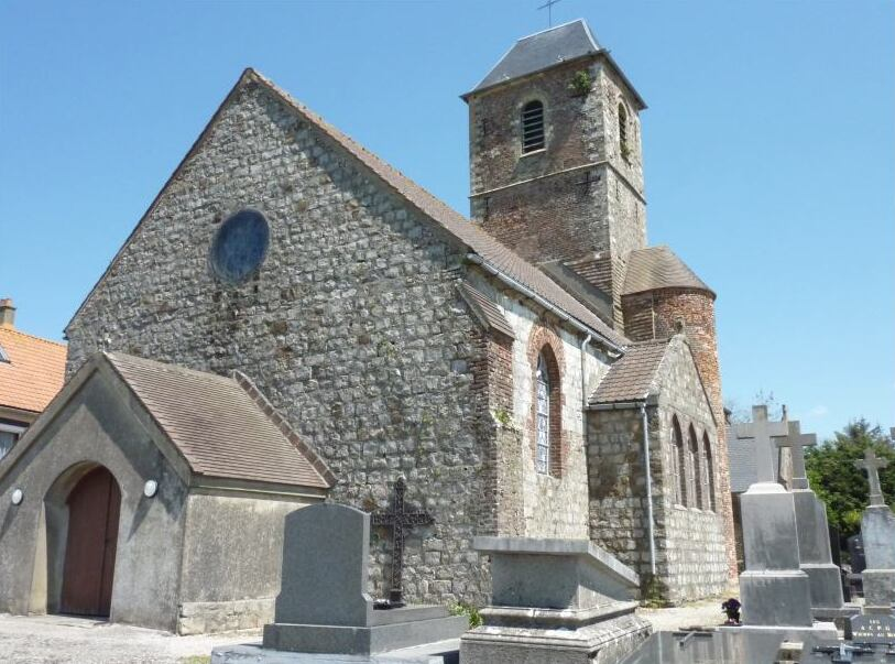 Eglise de Wierre au Bois